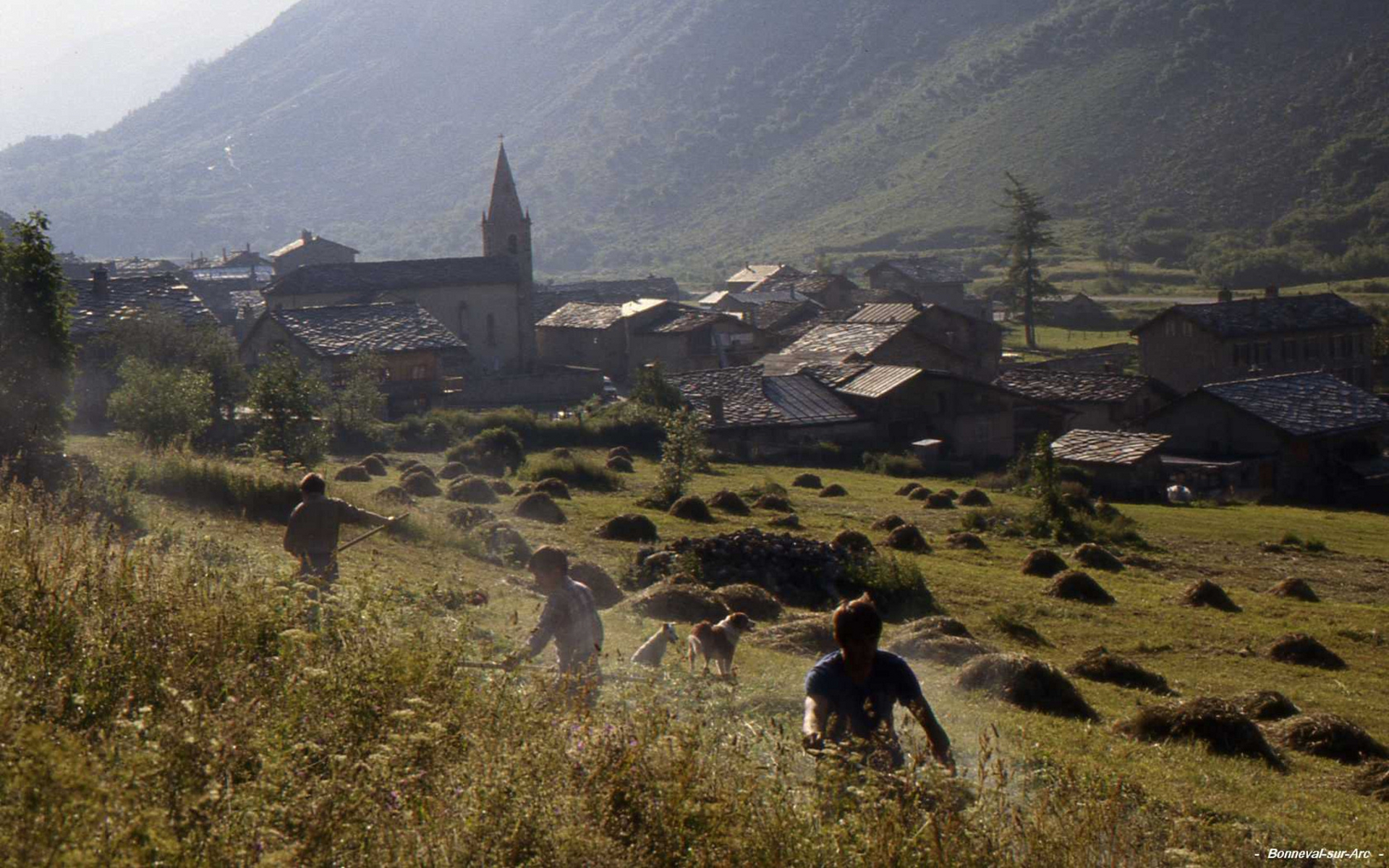 Bonneval-sur-Arc à l'aube. Travail dans les champs en juillet.